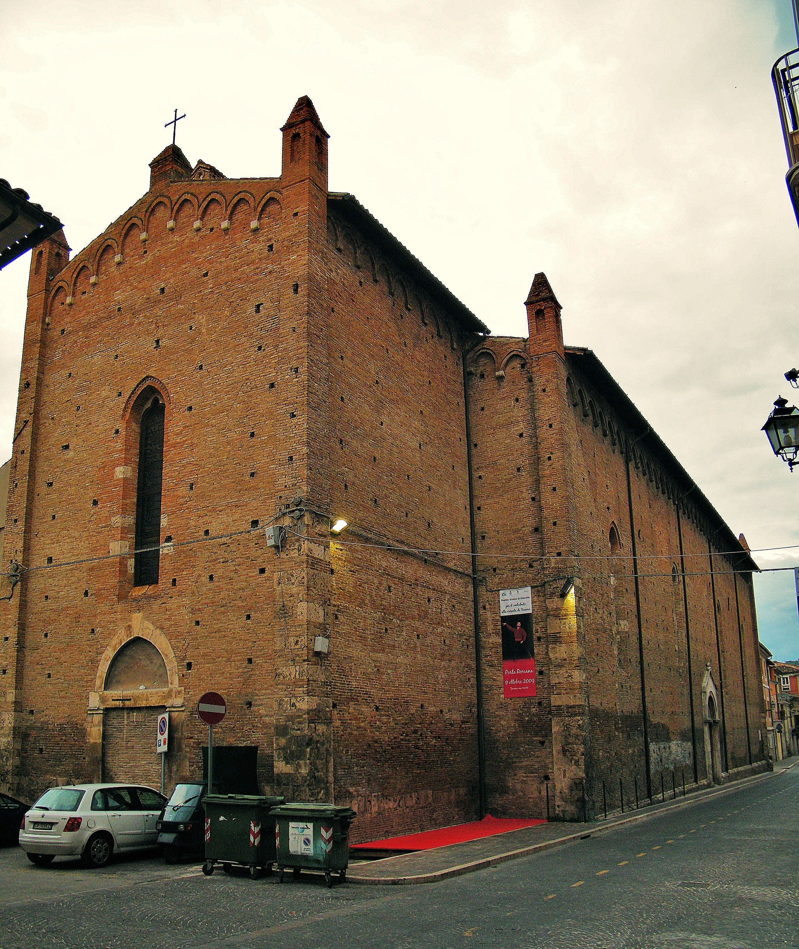 Chiesa di San Domenico (XIIIsec.) - Teramo